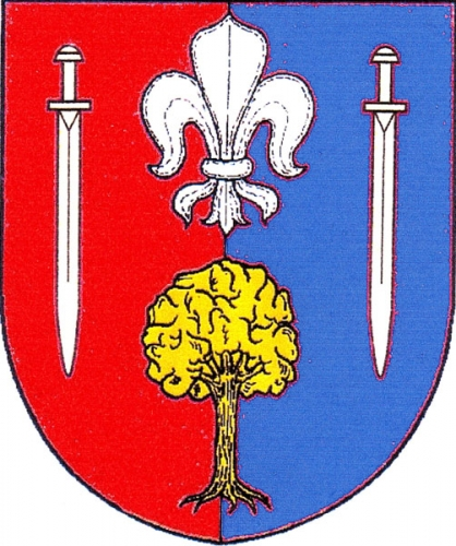 znak,Poděšín , okres Žďár nad Sázavou